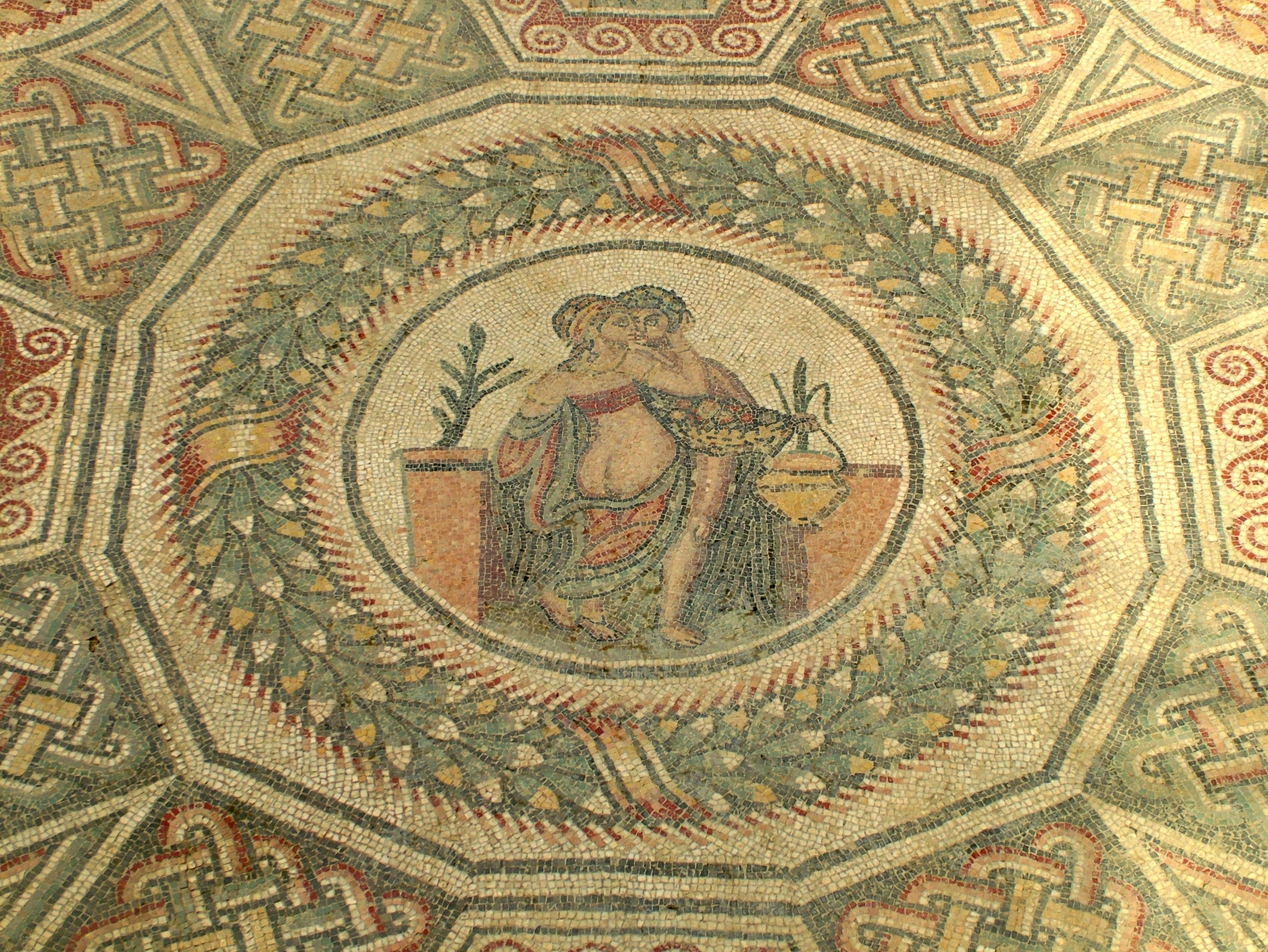 Piazza Americana, Sizilien, Villa Romana del Casale, ein Mosaik in dem Schlafzimmer (Privaträume) der Hausherrin, es zeigt ein Liebespaar.